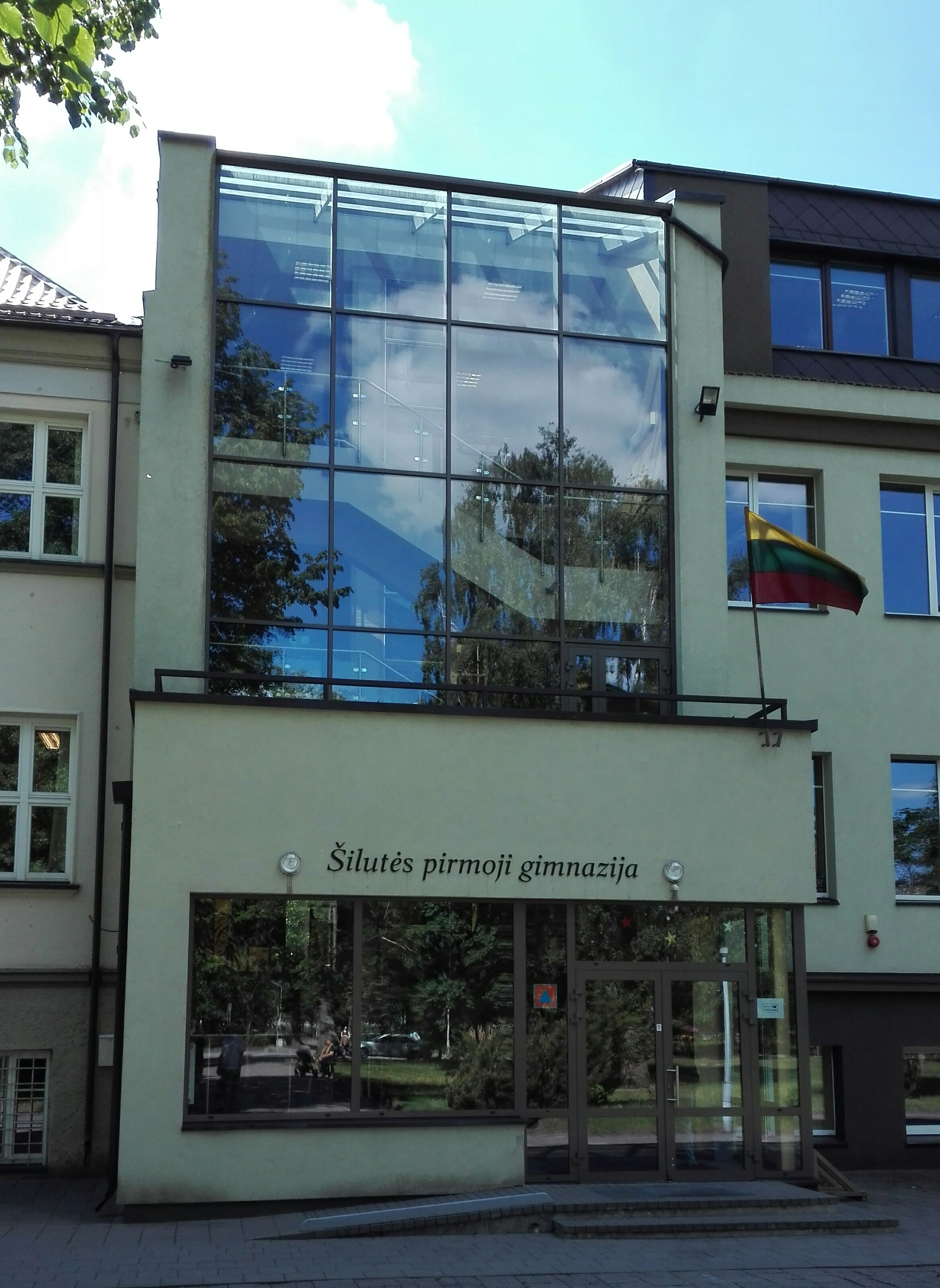 Šilutės pirmosios gimnazijos naujasis pastatas